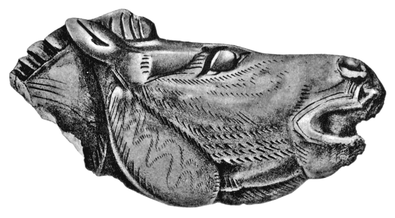 Darstellung eines prähistorischen Pferdekopfs aus Mas d'Azil (Pyrenäen, Frankreich) Museo de Saint-Germain-en-Laye